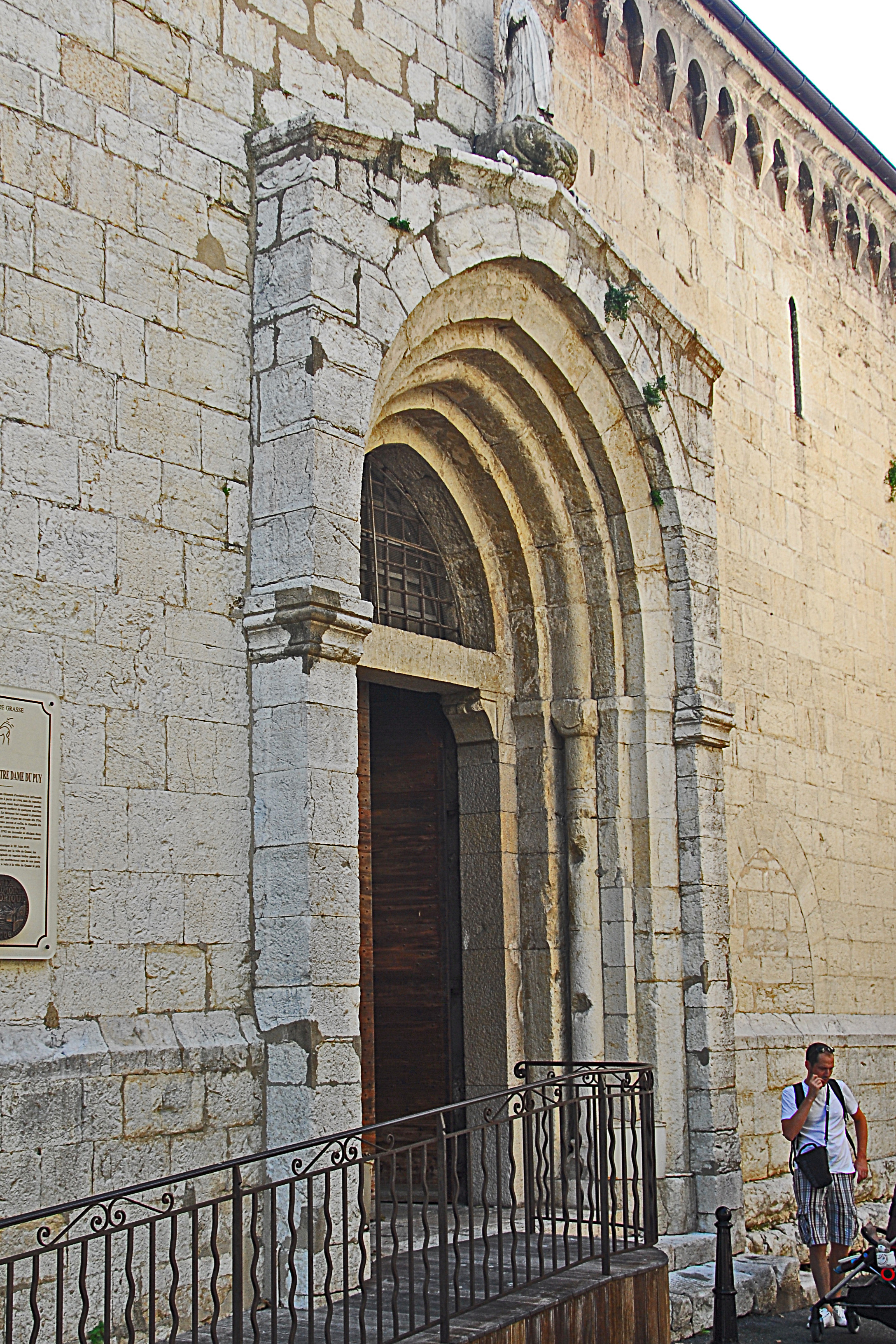 Kathédrale Notre-Dame-du-Puy von Grasse, Nordportal